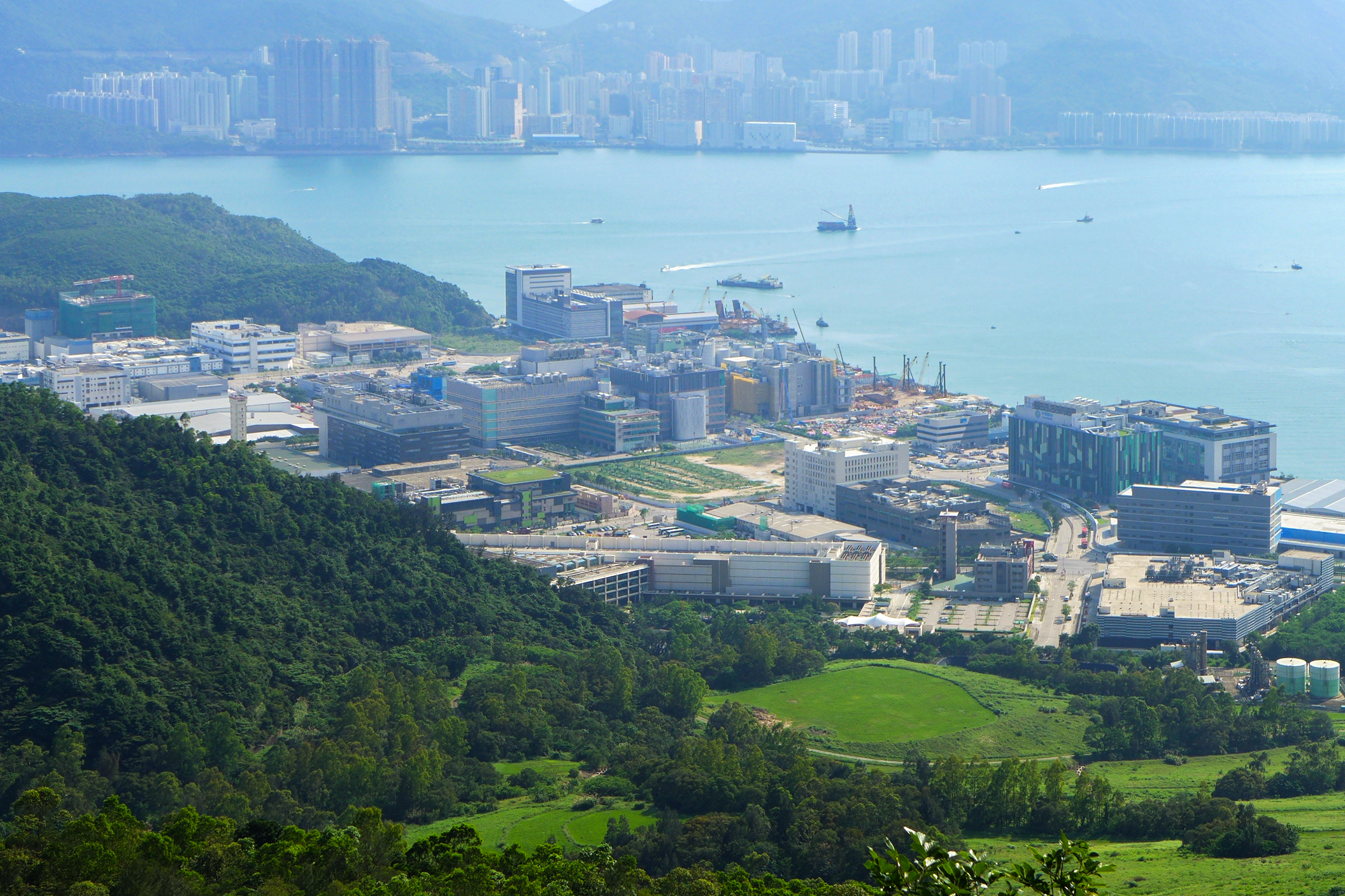 Tseung Kwan O Industrial Area